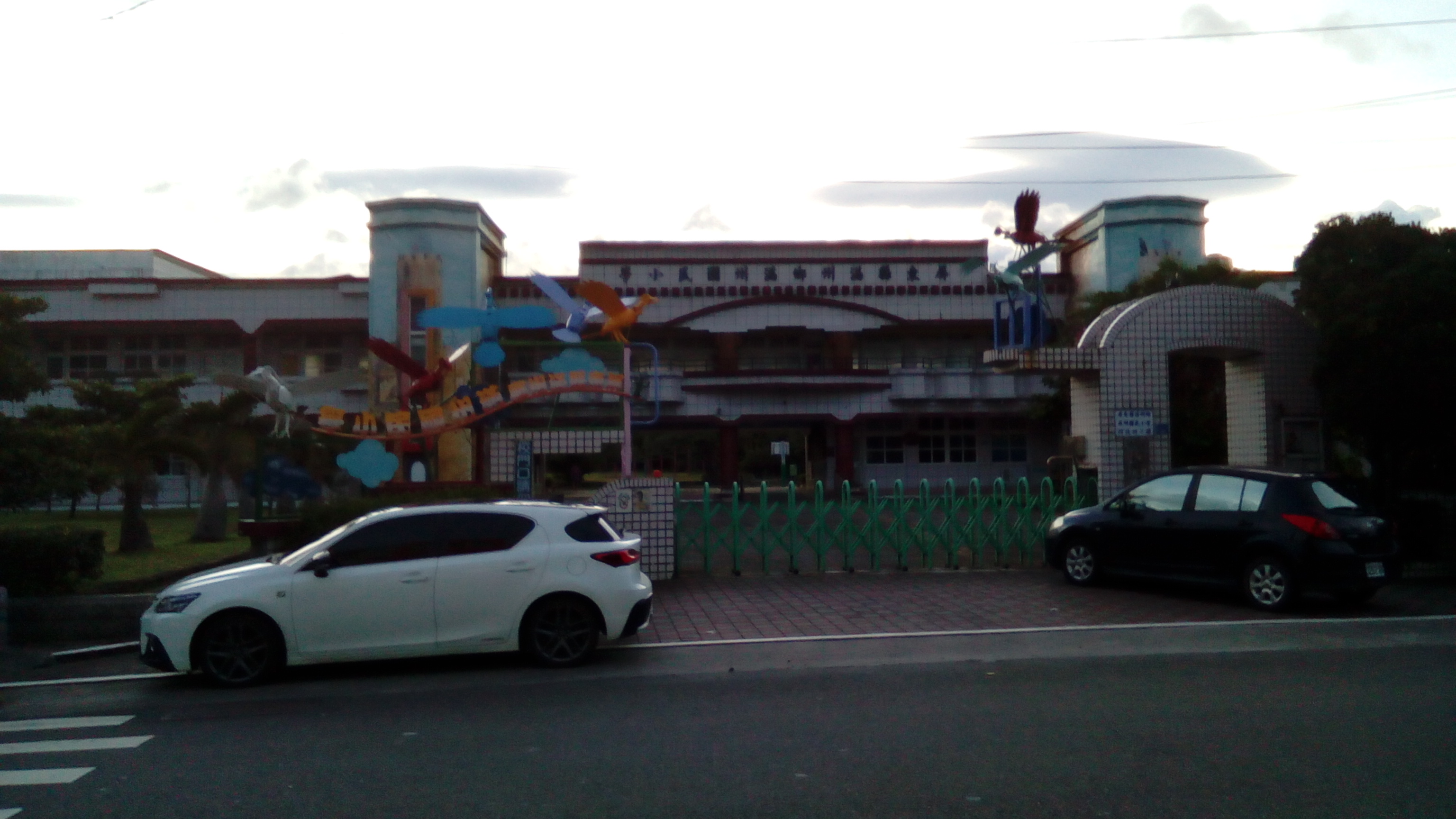 屏東縣滿州鄉滿州國民小學正門。在滿州農會超市前拍攝。